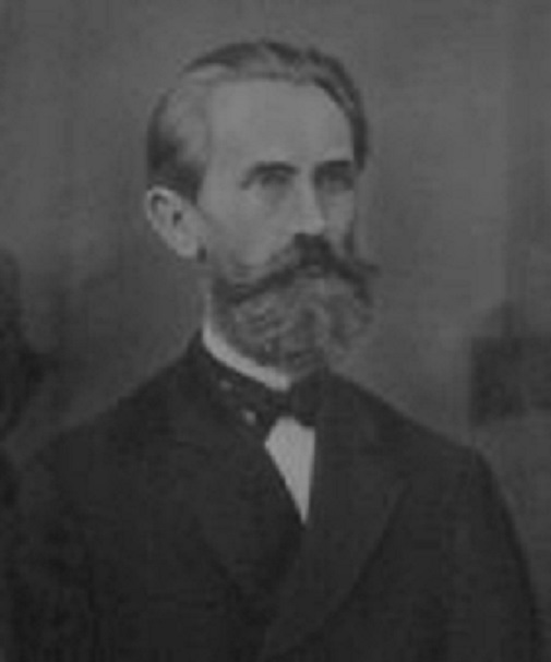 Albert Voigt Fabrikbesitzer und Ehrenbürger Wörth Donau